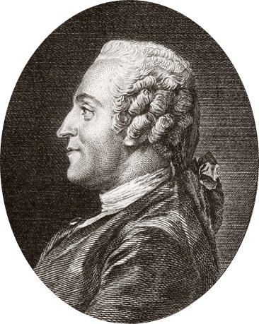 Portrait of Jean-François Marmontel (1723-1799)